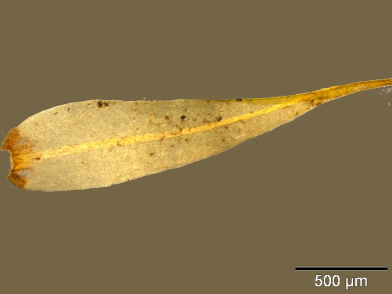 Langblättriges Gabelzahnmoos (Dicranum elongatum), Blatt, Vergrößerung: ~40x